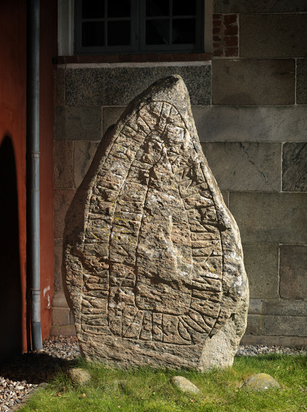 Foto: nationalmuseet ved Roberto Fortuna